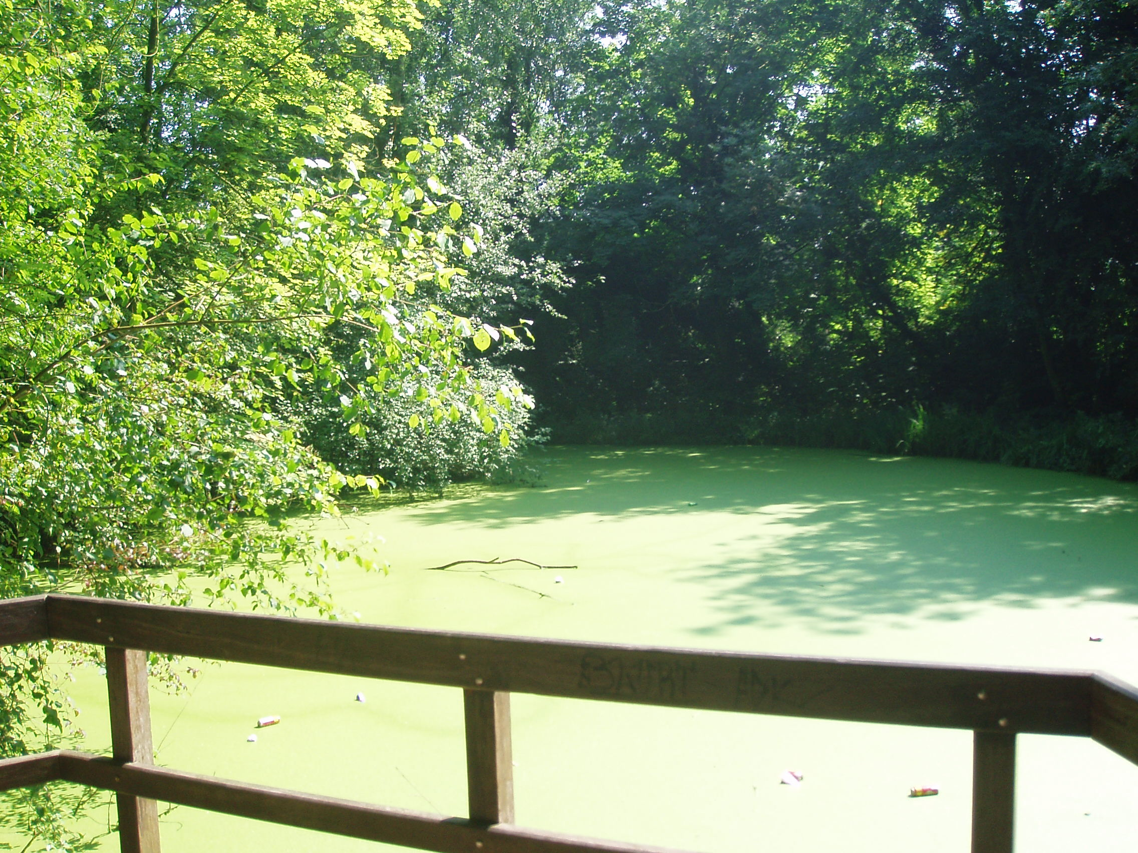 Parc Bergoje plateforme et étang Auderghem Belgium